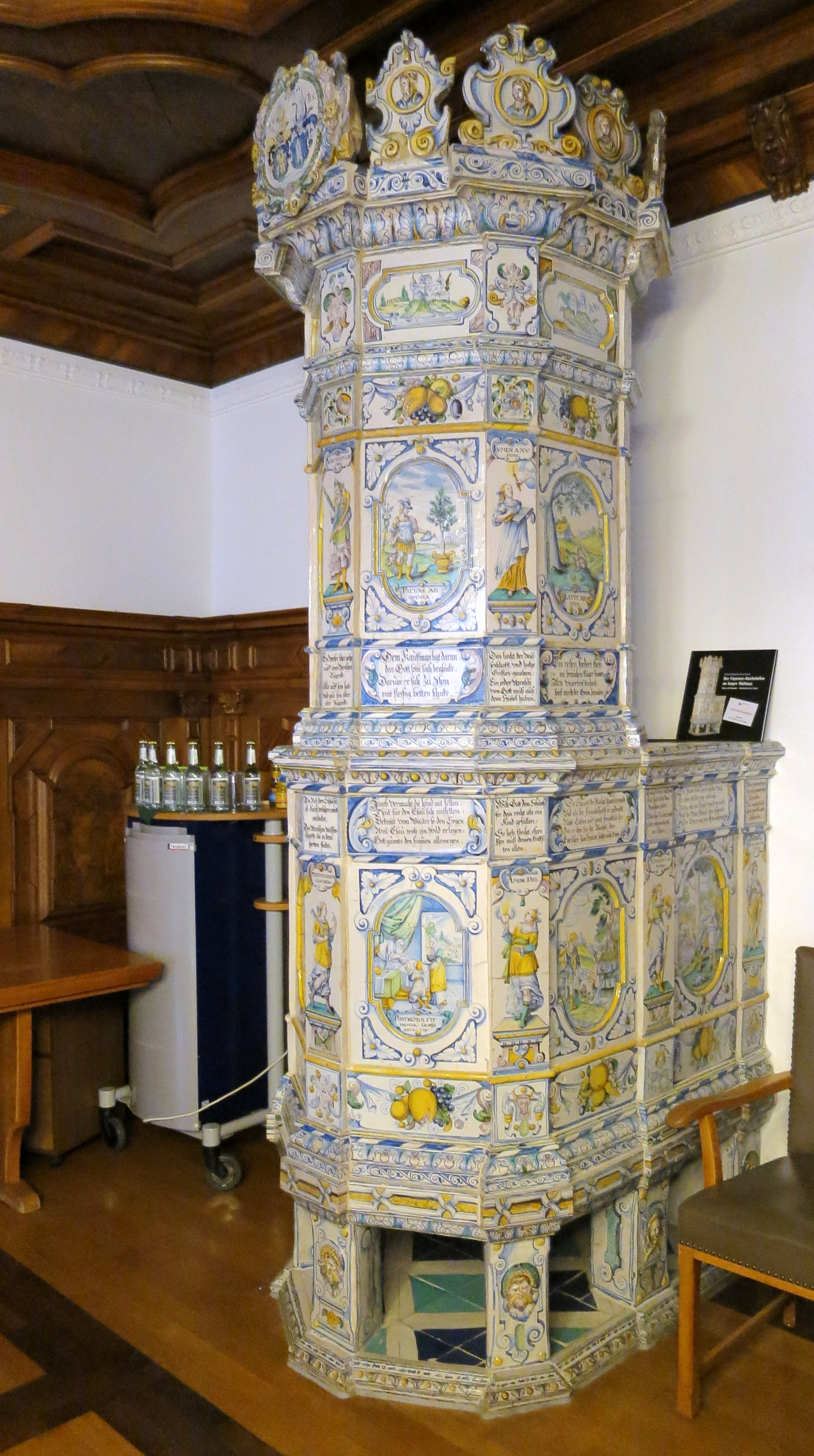 Das Rathaus ist ein altes Patrizierhaus mit einem Fayence-Kachelofen aus Winterthur